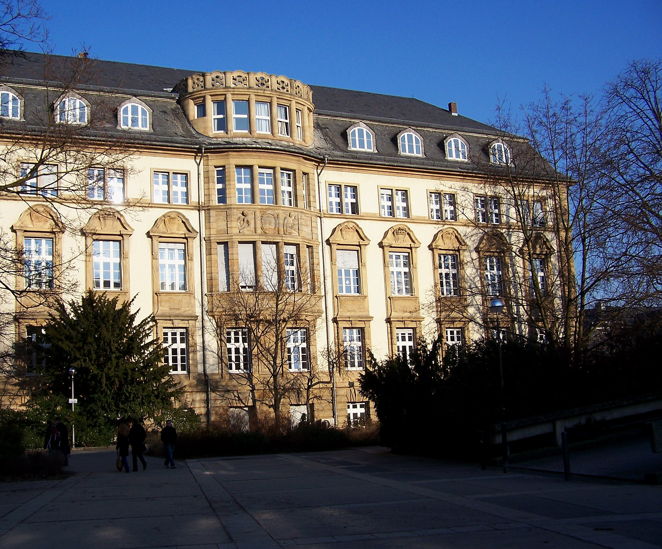 Technische Universität Darmstadt Gebäude S1|02, Altes Hauptgebäude Westflügel